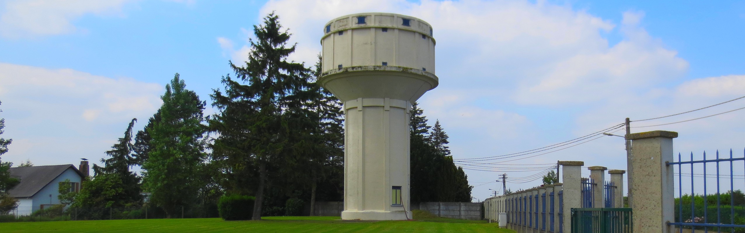 Petit-Enghien